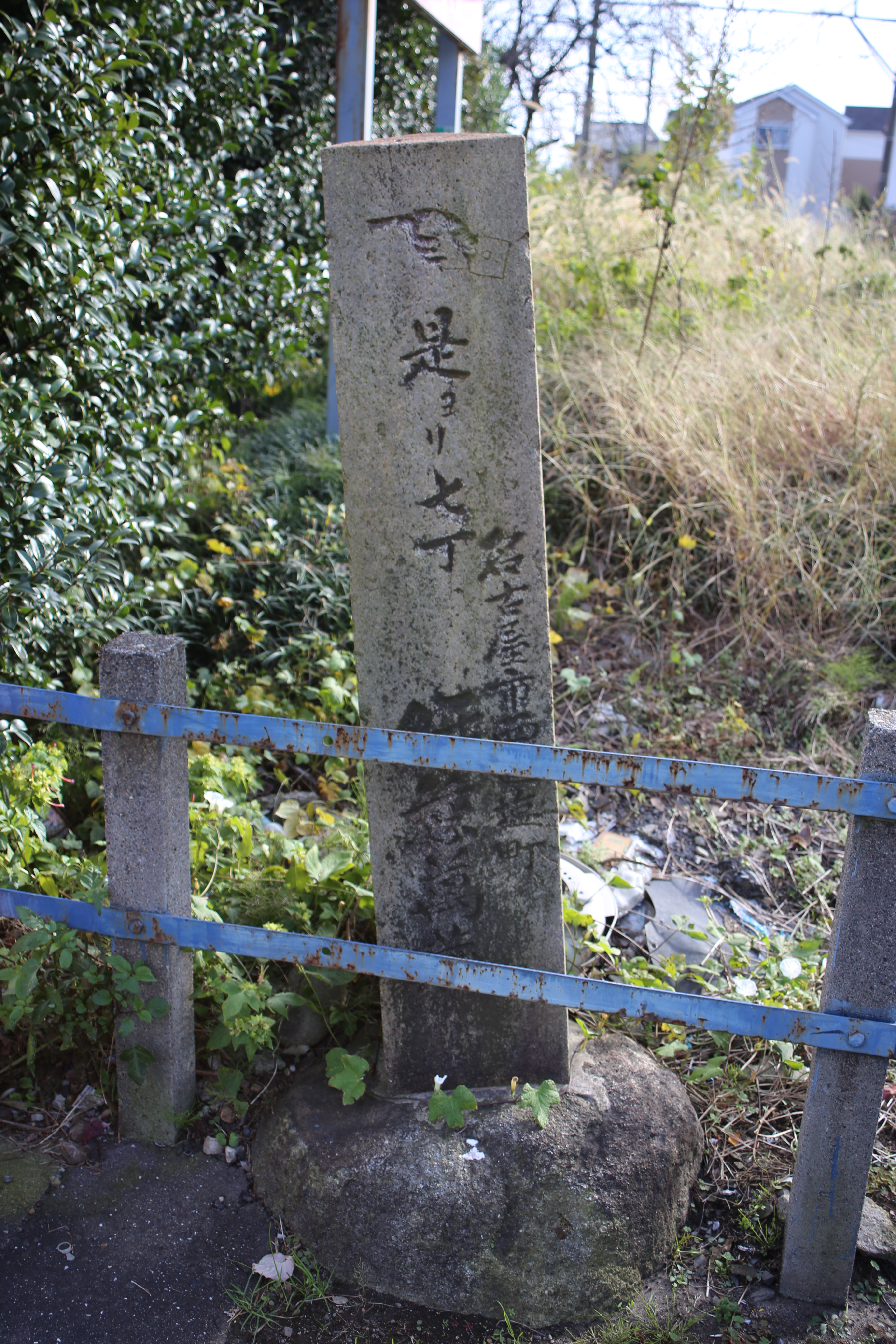 愛知県岩倉市 伊藤萬蔵によるみちしるべ